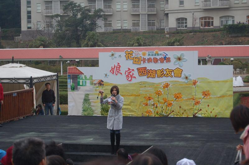 中文（台灣）: 民間全民電視公司八點檔連續劇《娘家》在苗栗縣三義鄉西湖渡假村舉辦影友會。